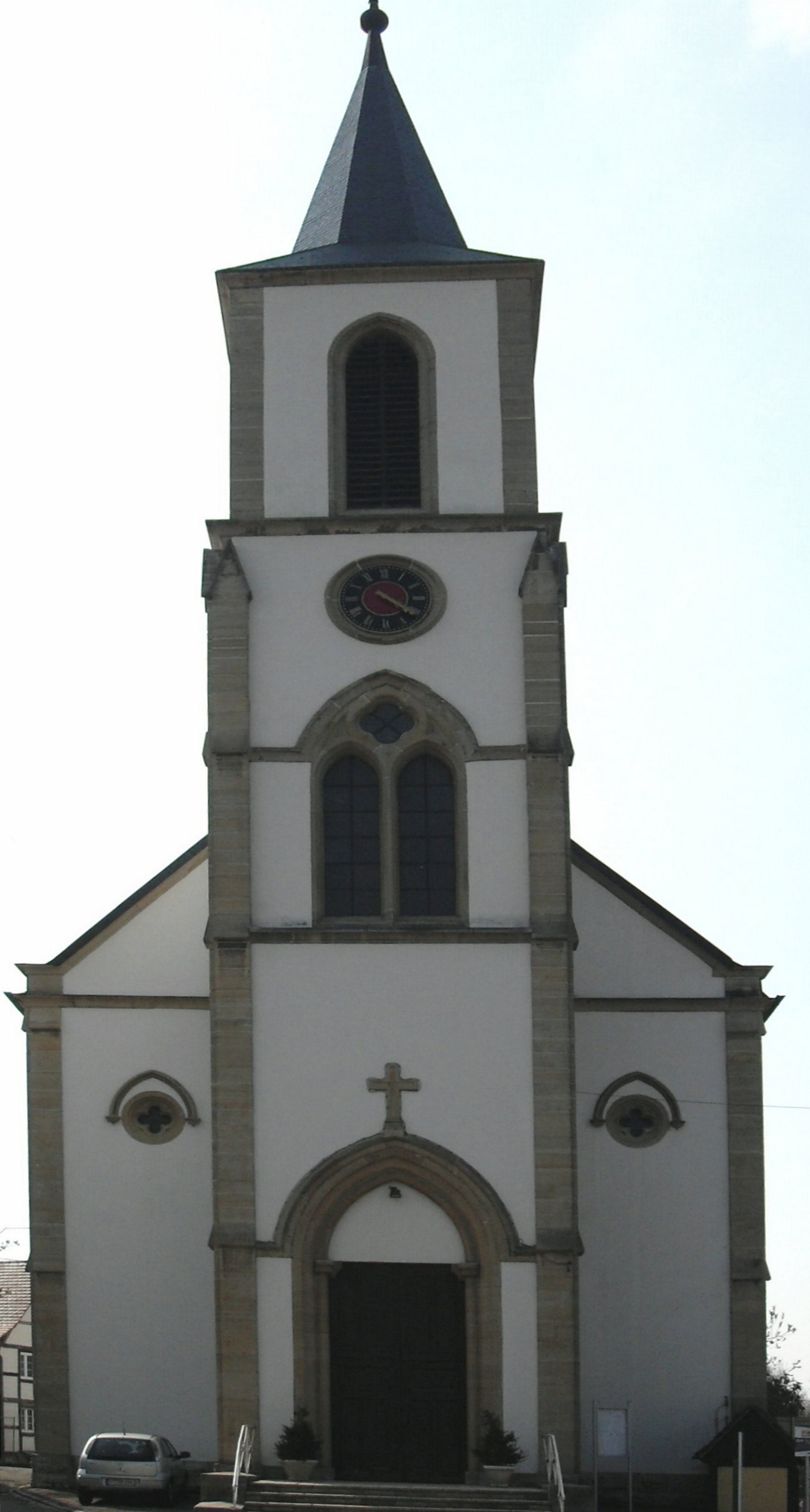 L'église Saint-Léger à Kœtzingue